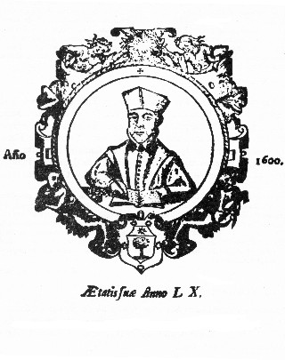 Grabado con la imagen de Cairasco, realizado por autor anónimo, que aparece en las ediciones del Templo Militante de 1602 a 1614.